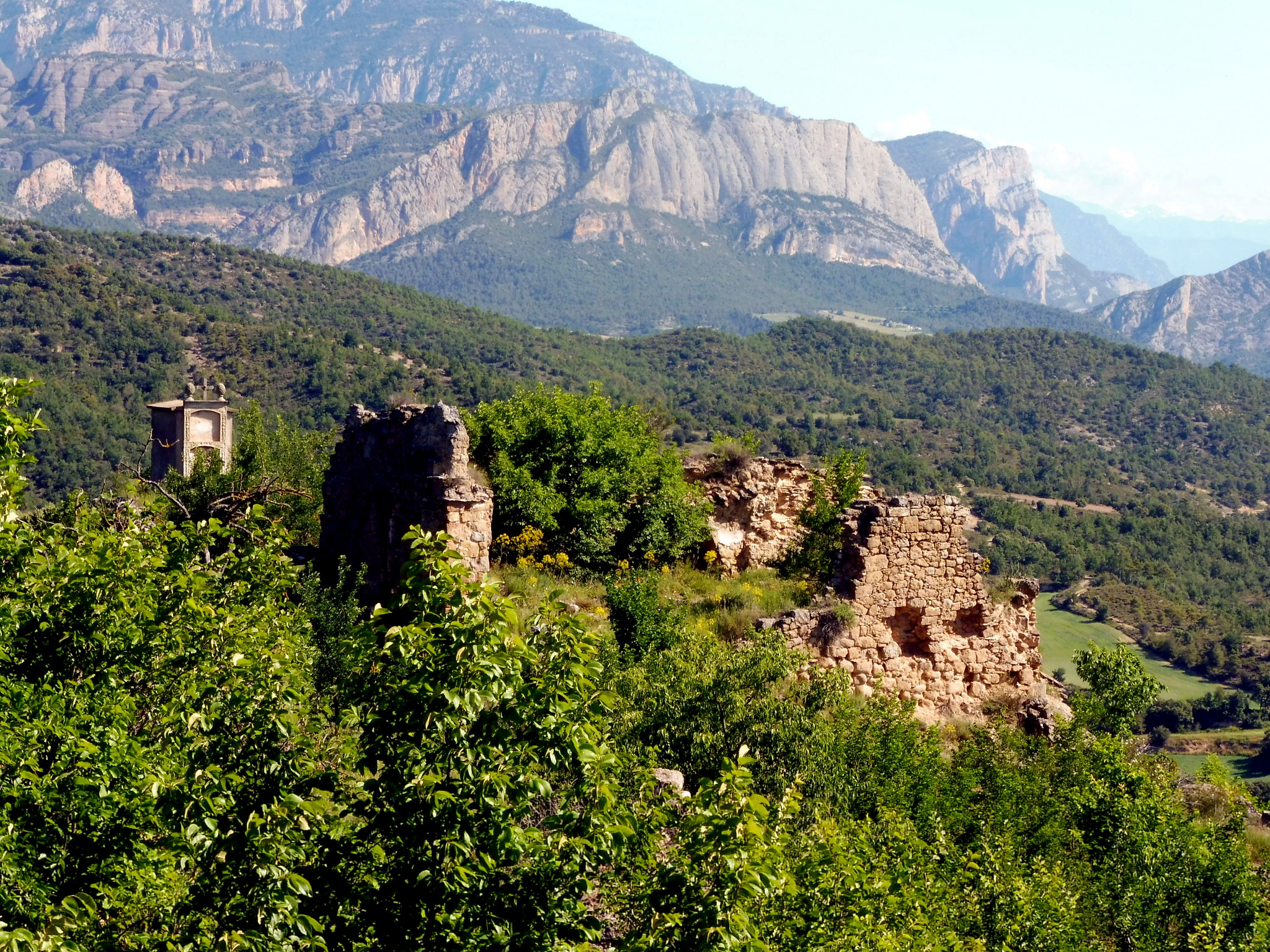 Castell d'Aguilar (Bassella): església de Sant Serni i el cementiri